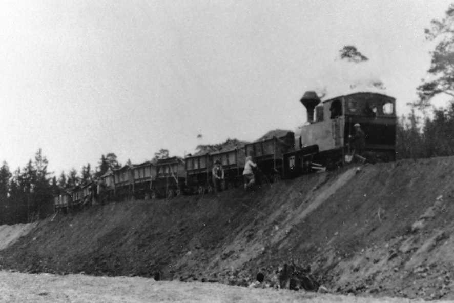 Zug der Abraumbahn der Grube Messel auf der Halde zum abkippen